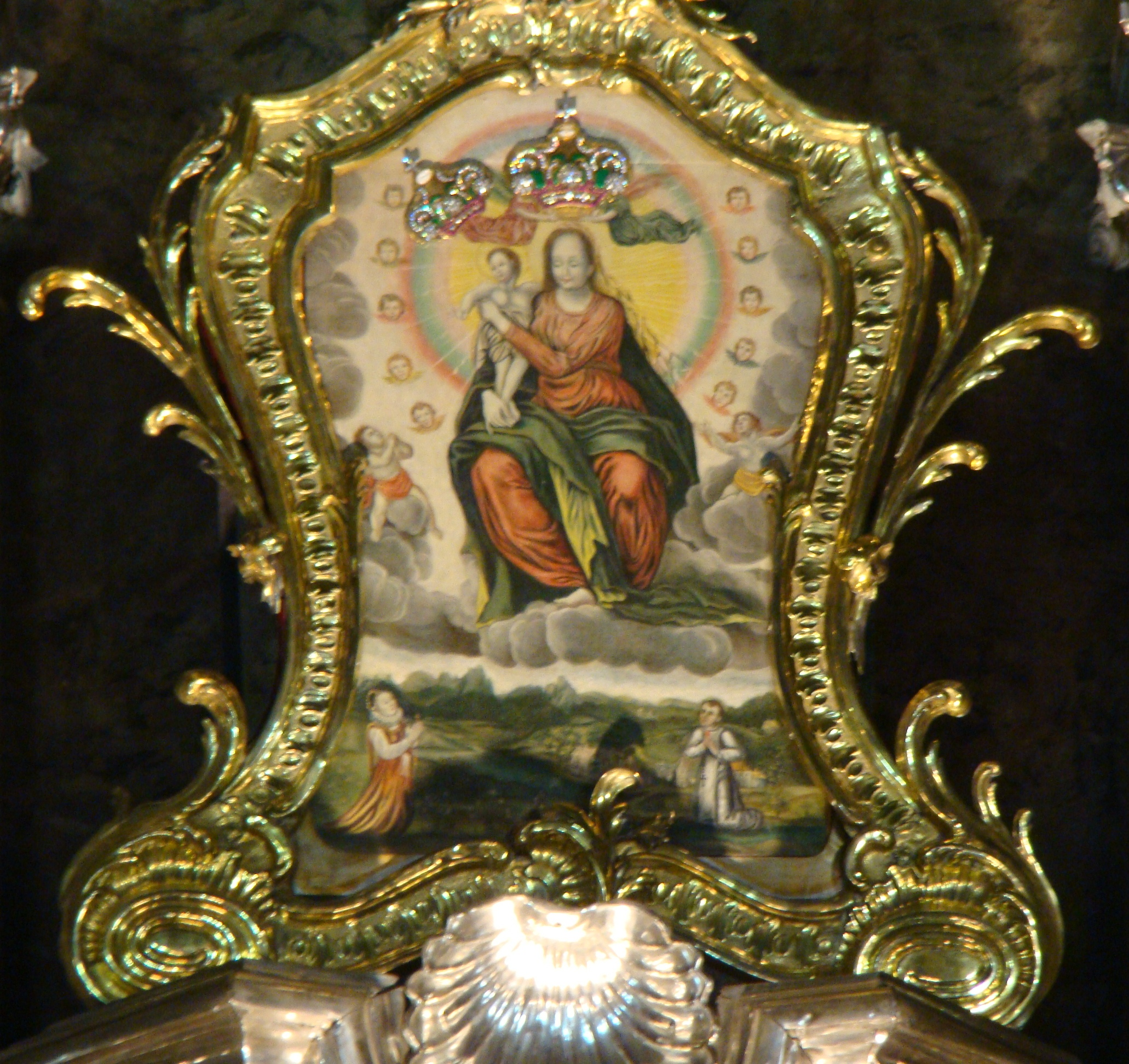 Obraz Matki Bożej Łaskawej w katerze we Lwowie